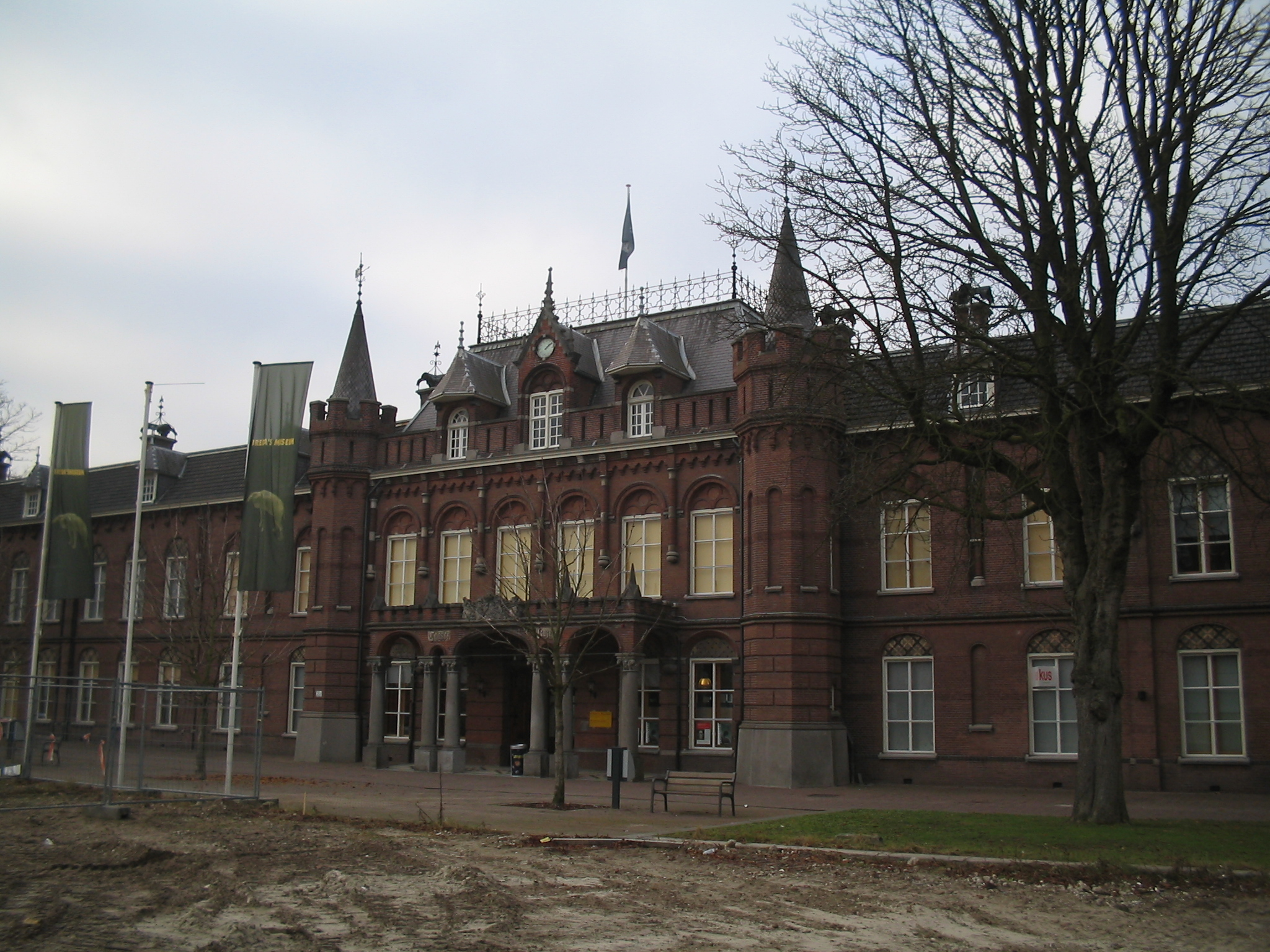 Zicht op een deel van de Chassékazerne in december 2005. Hierin is nu nog gevestigd het Stadsarchief Breda. Voorheen ook het Breda's Museum en het Stedelijk Museum Breda